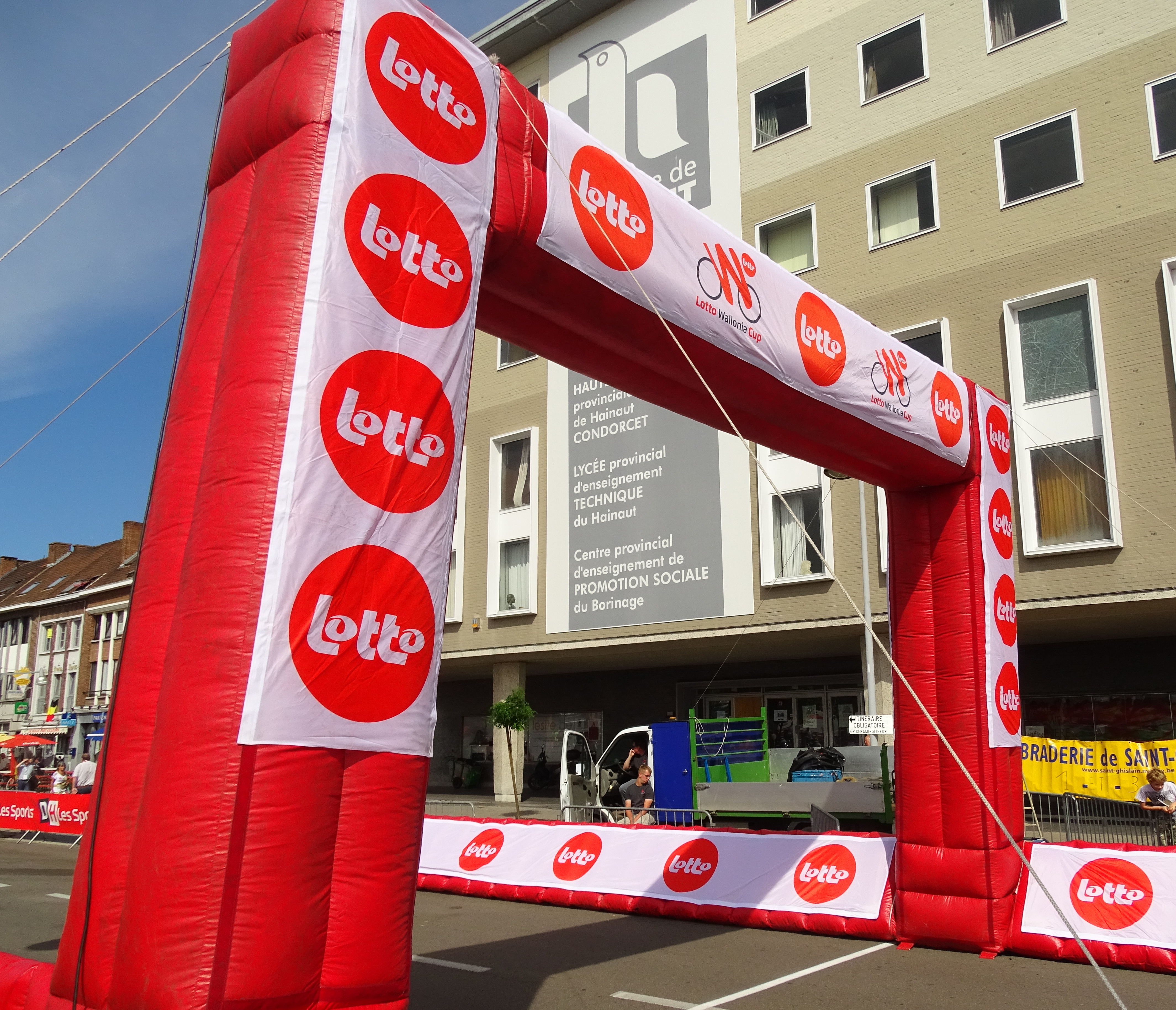 Reportage réalisé le mercredi 22 juillet à l'occasion du départ du Grand Prix Pino Cerami 2015 à Saint-Ghislain, Belgique.